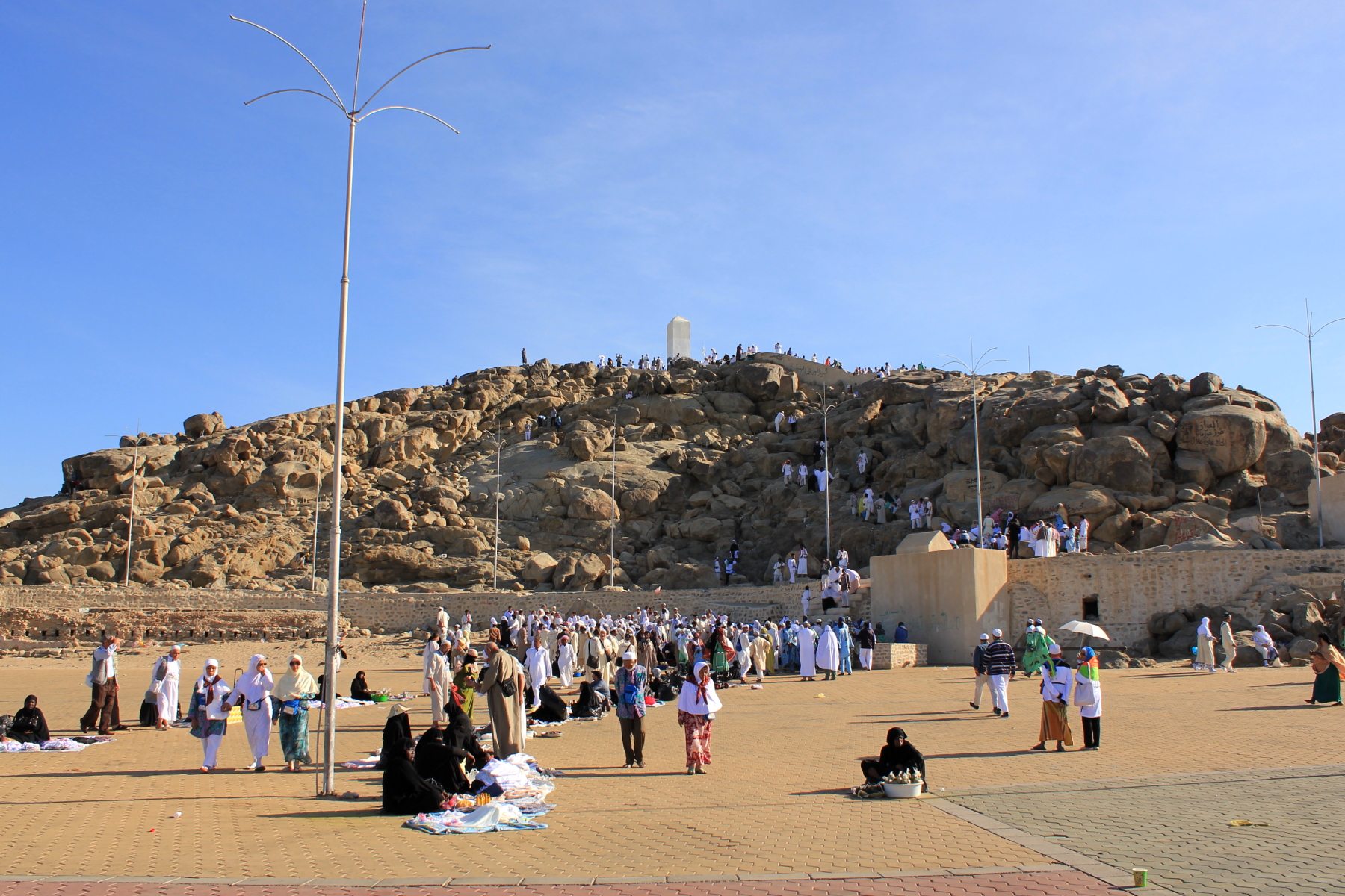 Mount Arafat or Mount Arafah or Jabal ar-Rahmah